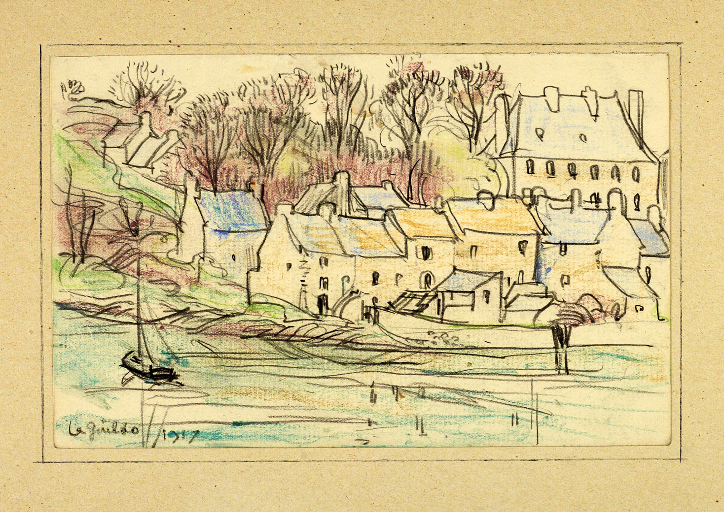 Petit port des Côtes d'Armor, 1917, dessin